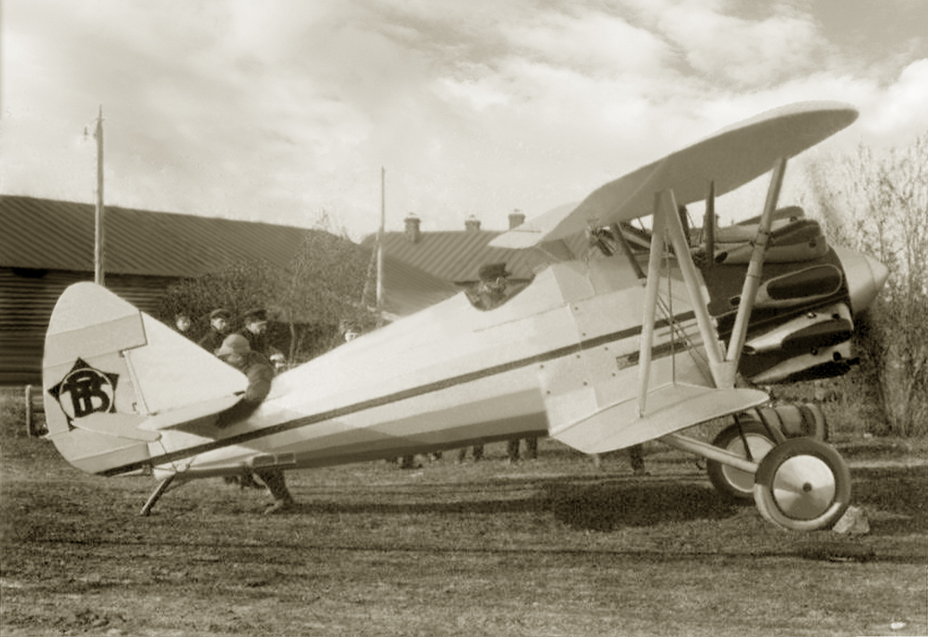 Перед первым полетом ВТ-11. Летчик Б.Л. Бухгольц уже в кабине. Слева за самолетом стоят: Д.П. Григорович, А.Г. Горянов-Горный и В.Л. Корвин. 28 апреля 1930 г.The VT-11 was the first prototype of the Polikarpov I-5